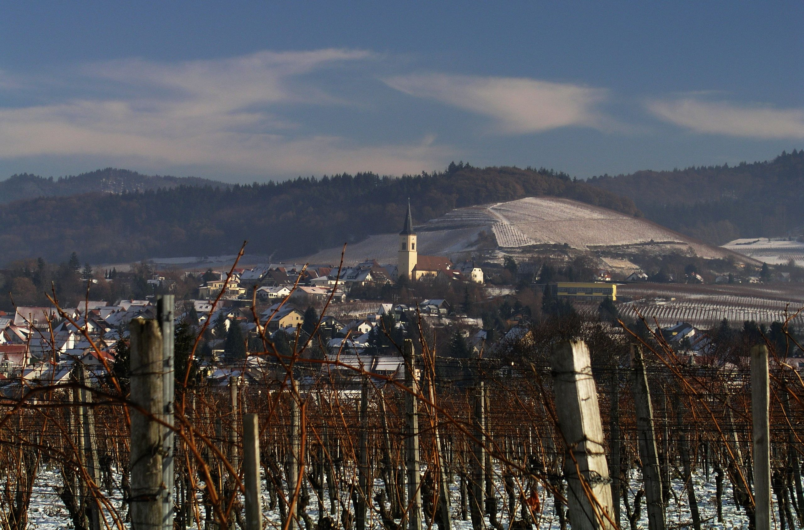 Ballrechten-Dottingen (Deutschland) im Winter